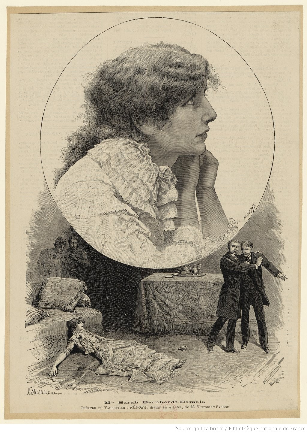 Fédora, drame de Victorien Sardou, Théâtre du Vaudeville, 11 décembre 1882, portrait de Sarah Bernhardt et Mort de Fédora (estampes de Fortuné Méaulle et Henri Meyer)